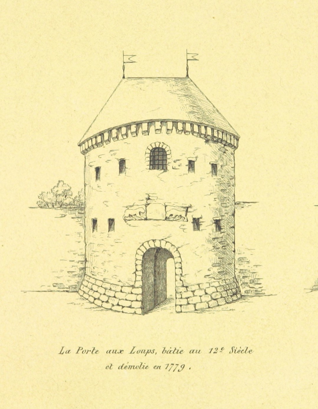 Wolvenpoort in Leuven, door Edward Van Even 1895, Louvain dans le Passé et dans le Présent